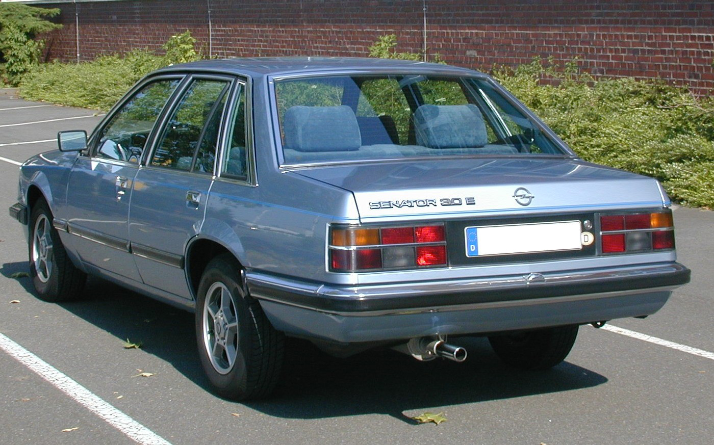 Opel Senator A1 3.0E CD 12/1978 hi.li.